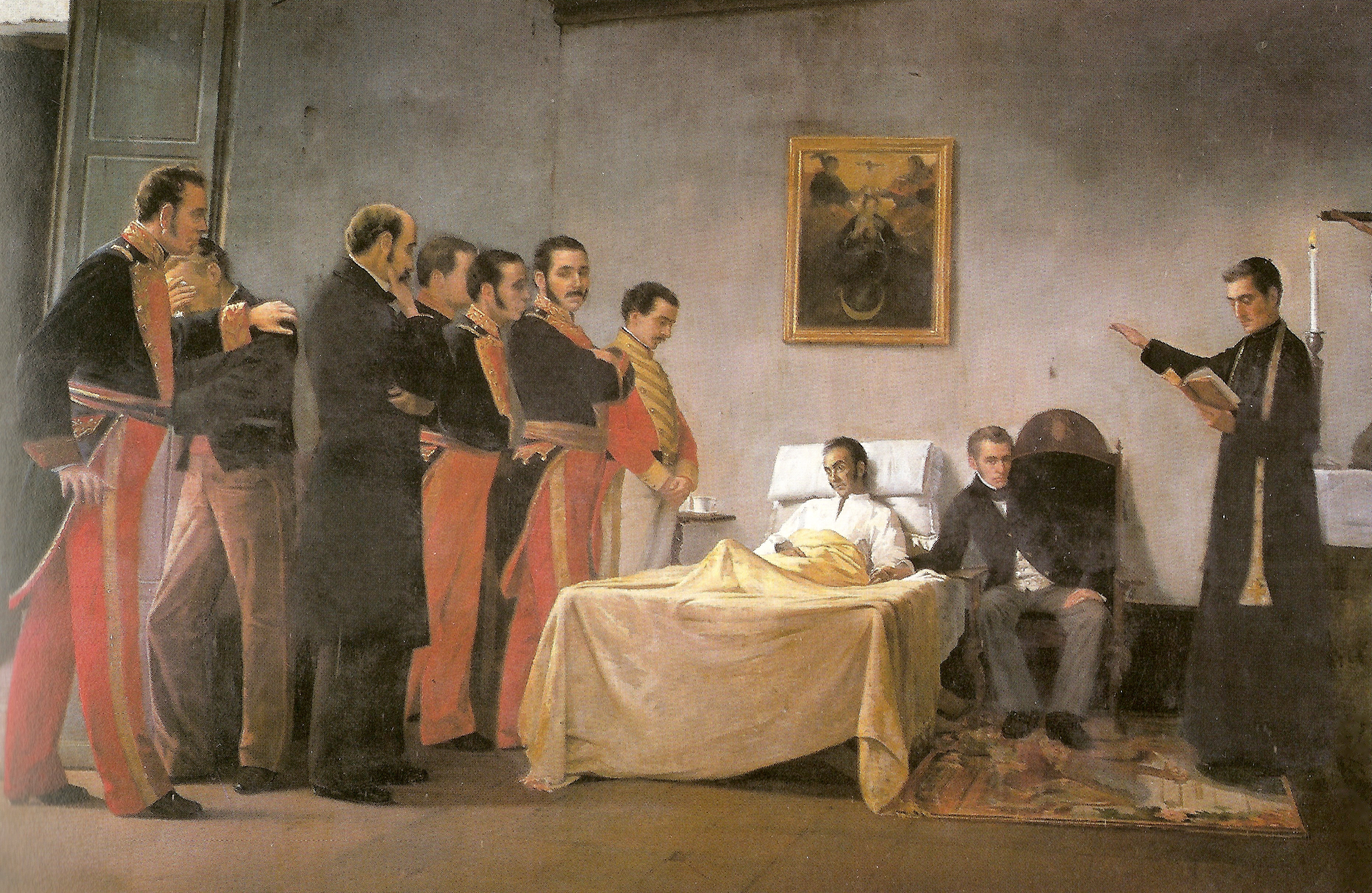 La muerte del Libertador. Óleo/tela, colección del Museo Bolivariano, Caracas - Venezuela